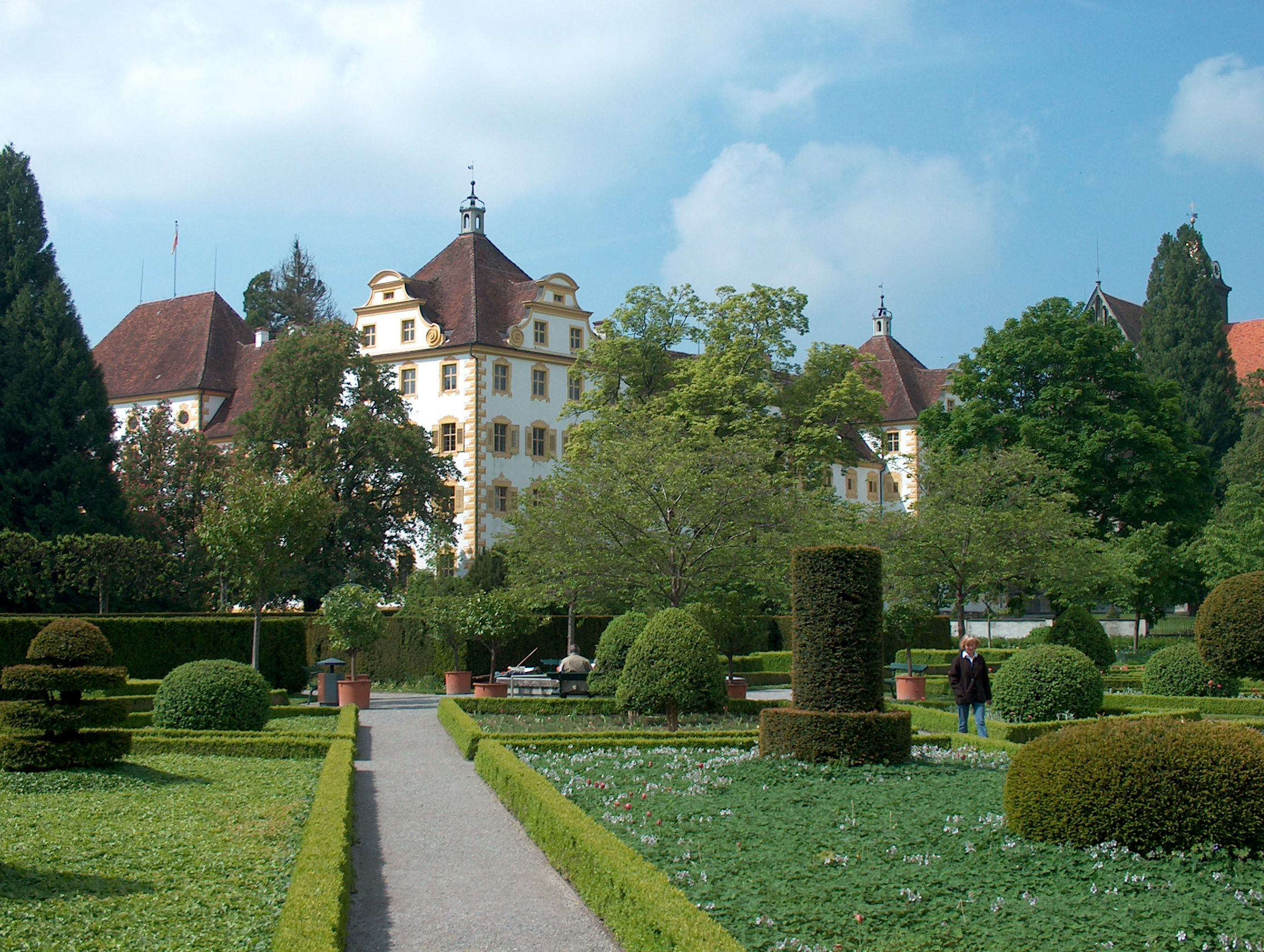 Die Garten und Parkanlage von Schloss Salem,BW.